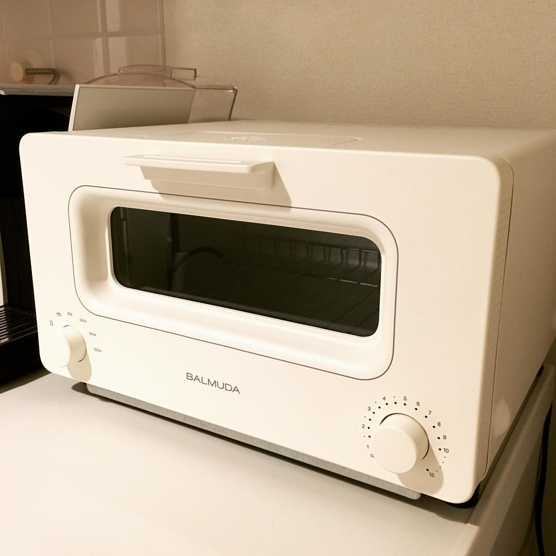 バルミューダ のトースター。いつか買うと思ってたけど、やっぱり買った。#balmuda